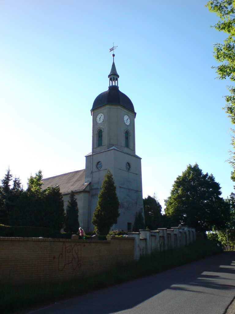 Die St. Pankratiuskirche des Leipziger Ortsteils Engelsdorf.